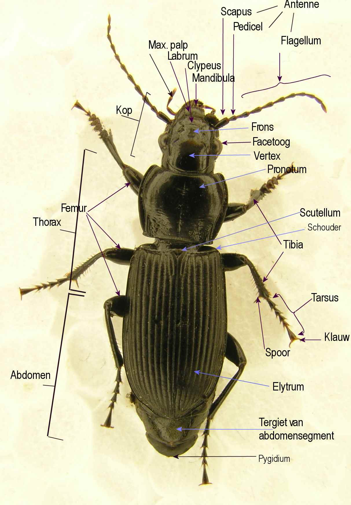 De anatomie van een kever Zelf gemaakt foto, zelf bewerkt om de benamingen van de diverse onderdelen aan te brengen. Vrij onder GNU FDL. E van Herk 1/5/2005. Bij opmerkingen of fouten gelieve mij een berichtje te sturen; ik kan nog makkelijk wijzigingen aanbrengen omdat ik de plaat in meerdere layers heb geëdit. Daarvan kan ik dan een nieuwe versie over de oude heen uploaden.